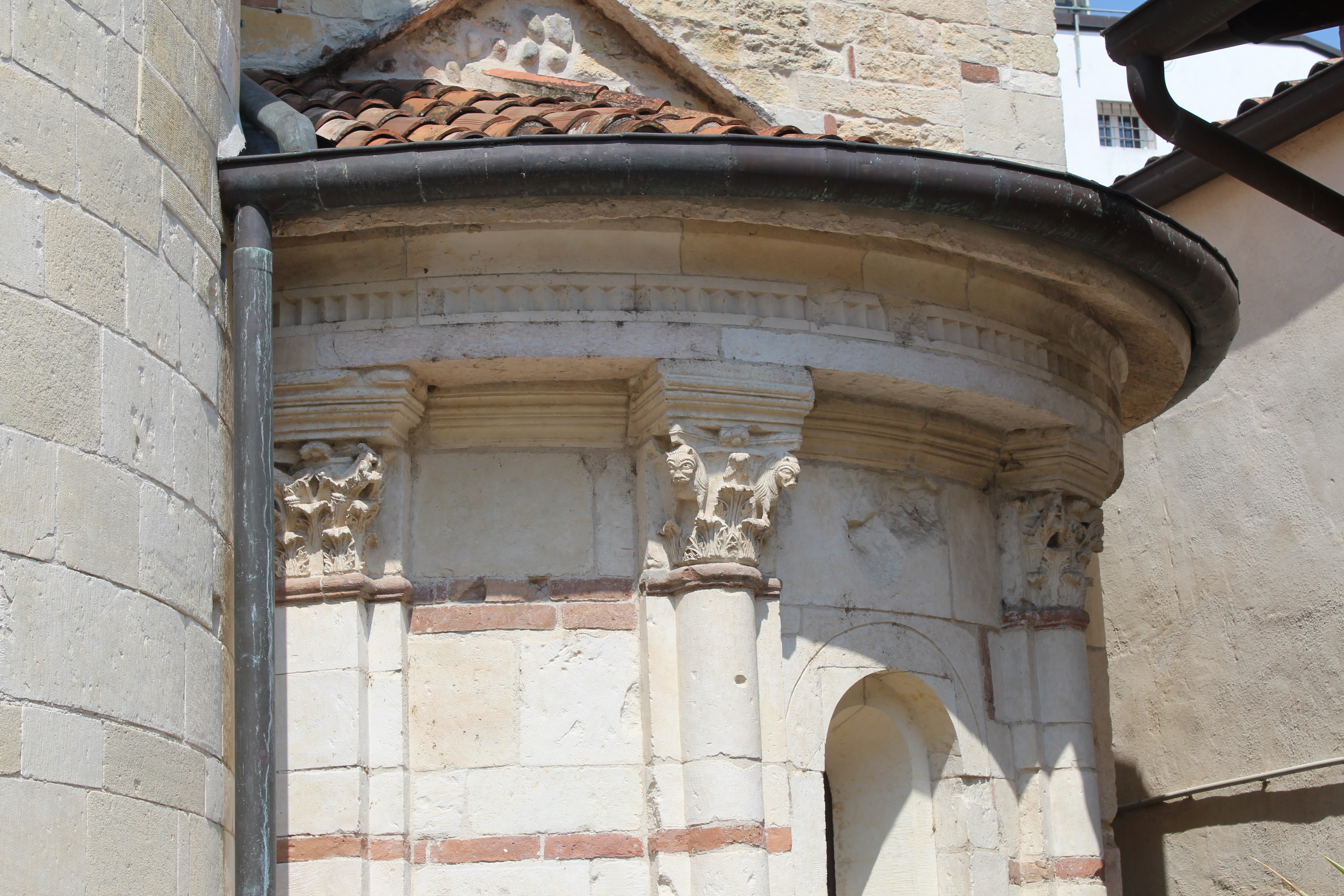 Chiesa di San Giovanni in Valle a Verona. Esterno.